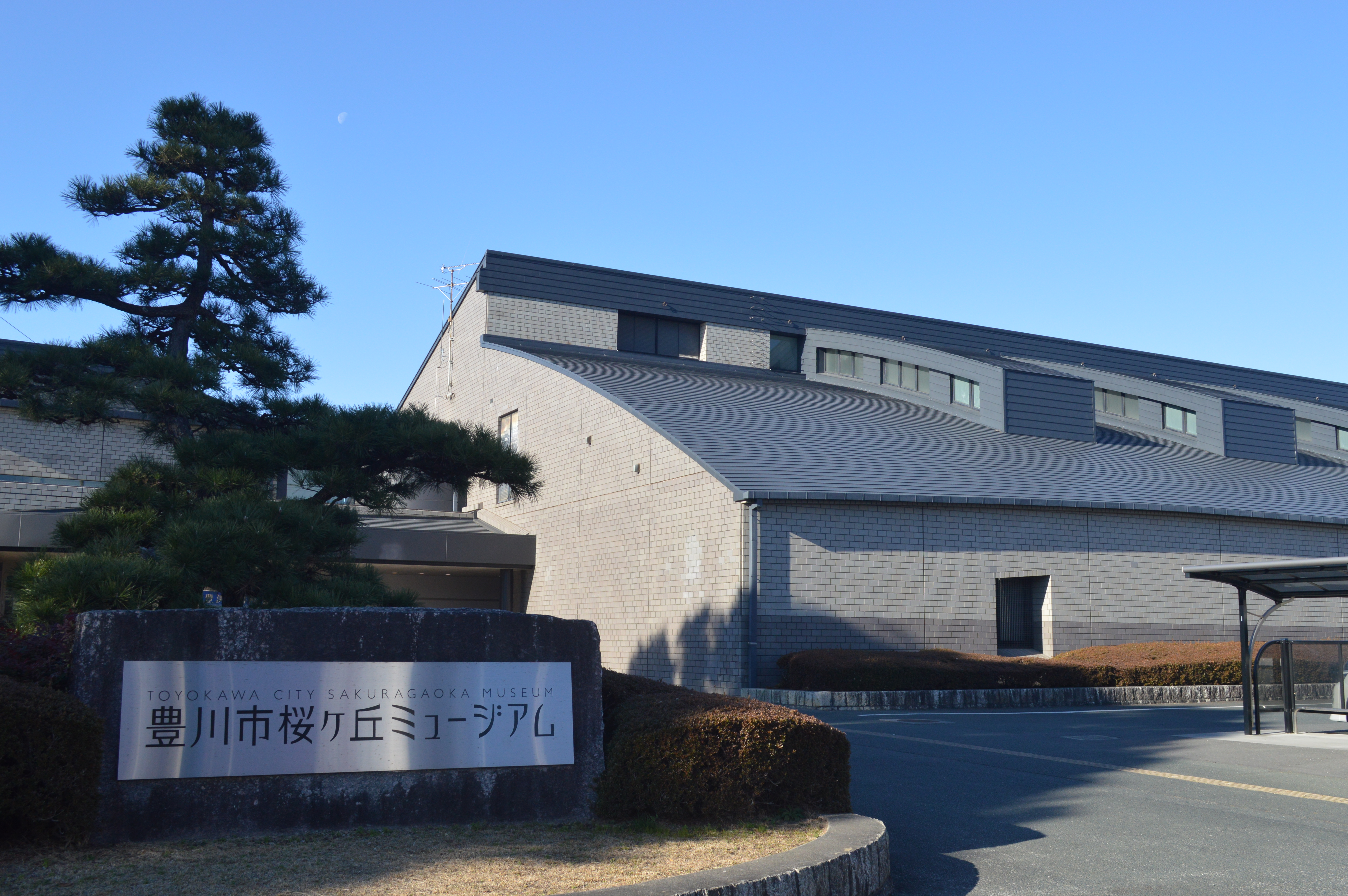 愛知県豊川市にある豊川市桜ヶ丘ミュージアム。